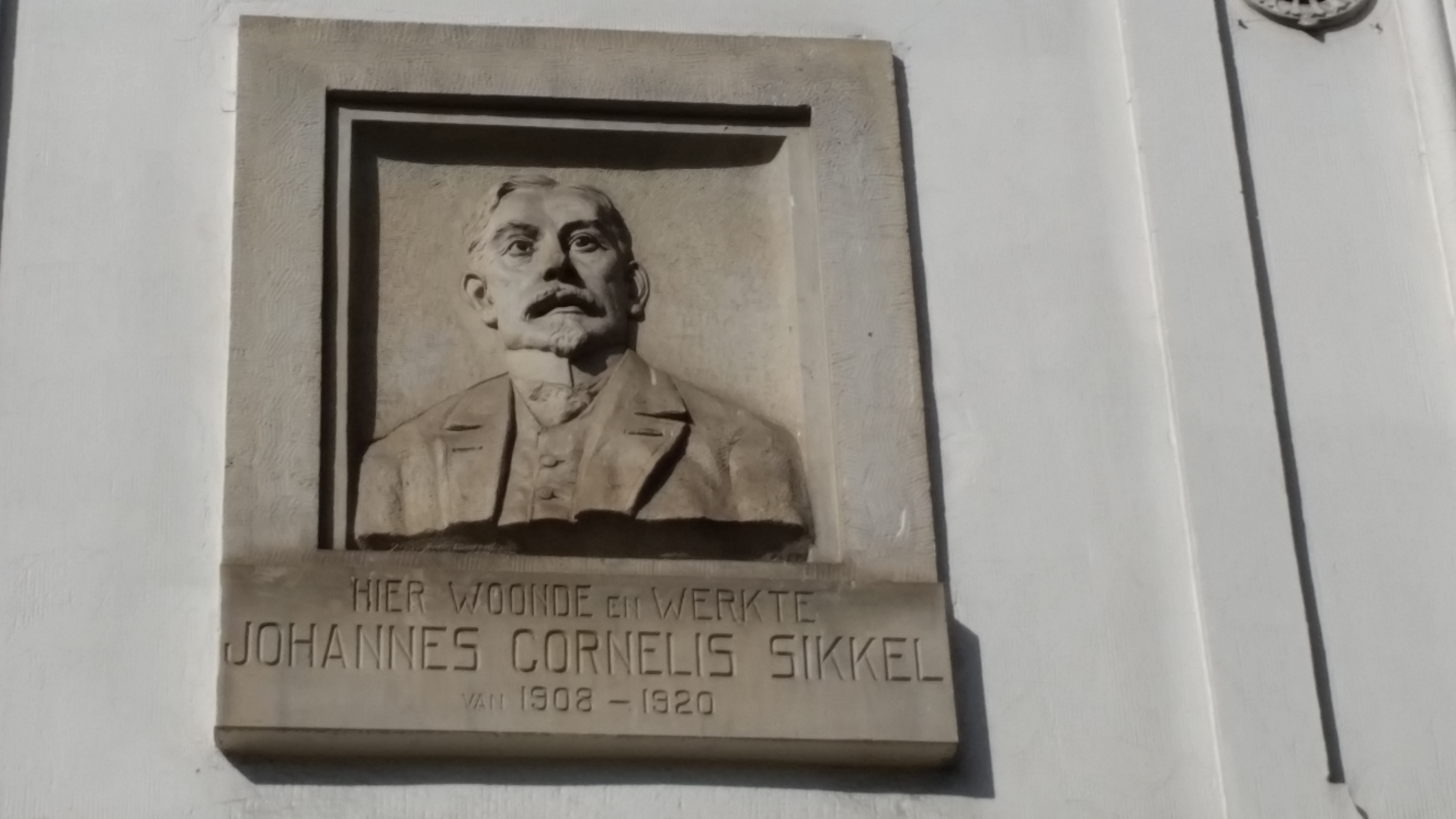 Impressie van Eerste Constantijn Huygensstraat 120 (lange gevel) en Vondelstraat 72 (korte gevel) in Amsterdam met o.a. beeltenis Johannes Cornelis Sikkel